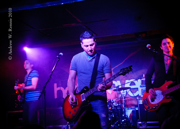 Concerto de Boyce Avenue em Glasgow